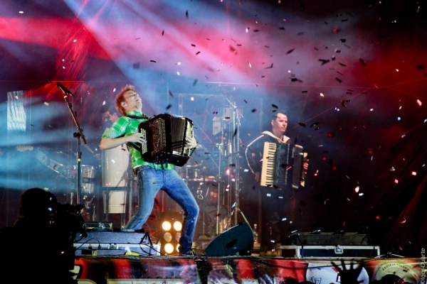 Michel tocando sanfona durante show em Catalão - GO